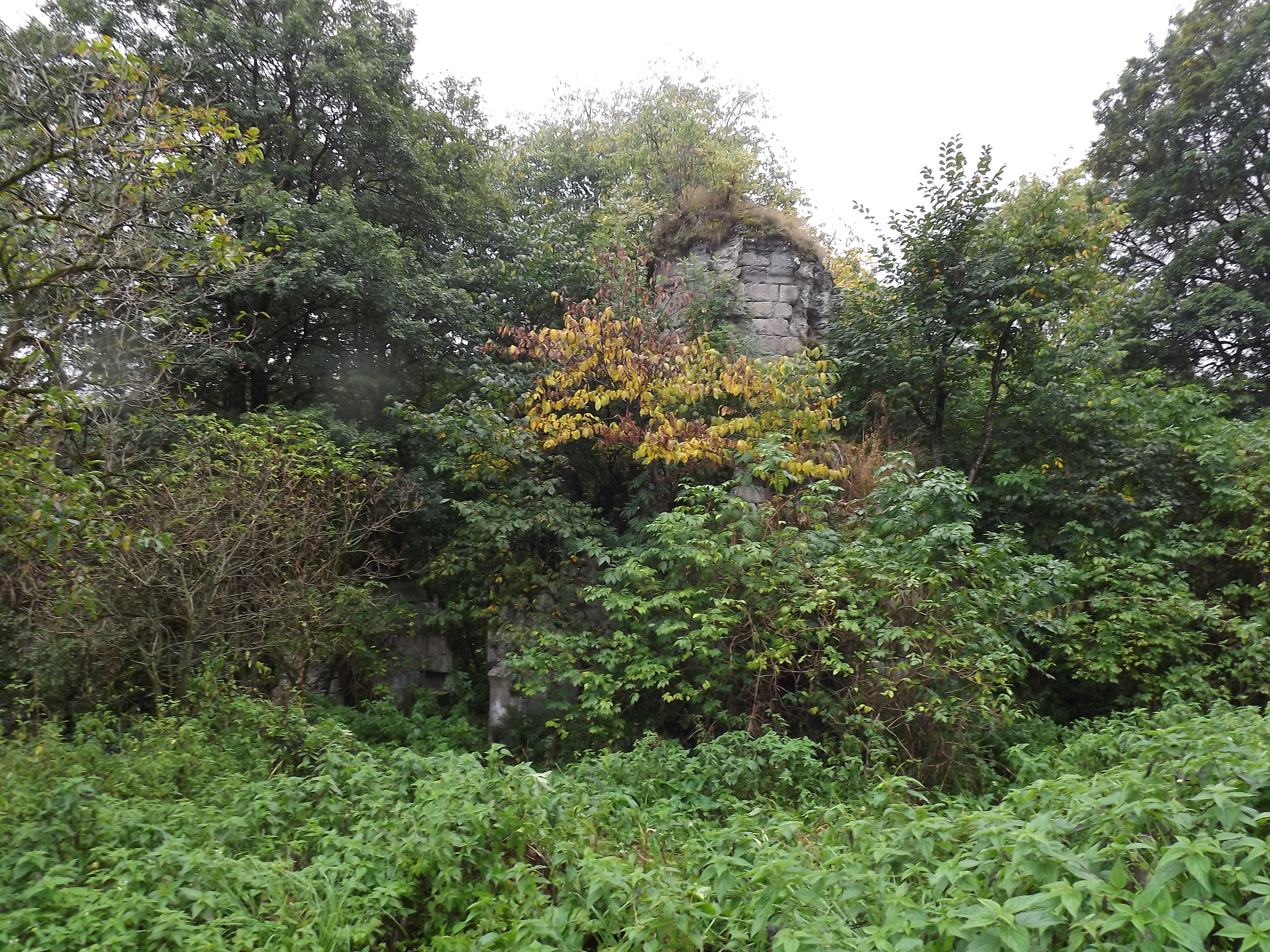 Վանական Համալիր «Սամսոն» 8/16